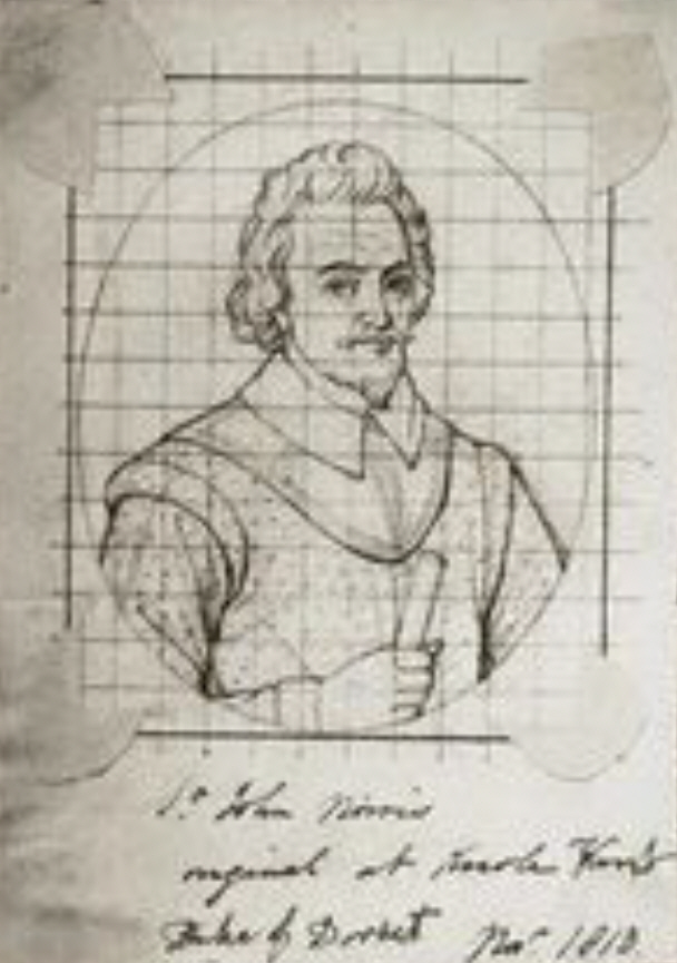 Sir John Norreys (* 1547; † 1597), englischer Heerführer. Zeichnung des 19. Jahrhunderts nach einem Gemälde des 16. Jahrhunderts